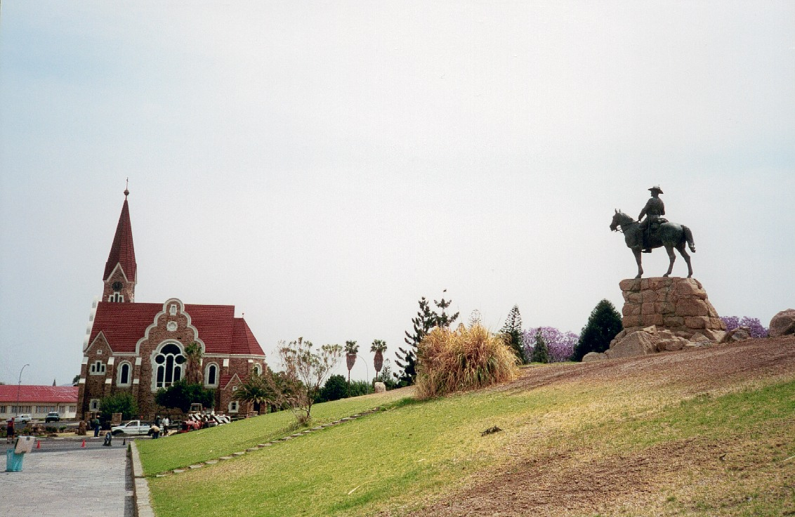 Photo personnelle 1996 Copyright : FC Georgio Sujet : Eglise luthérienne de Windhoek, Namibie